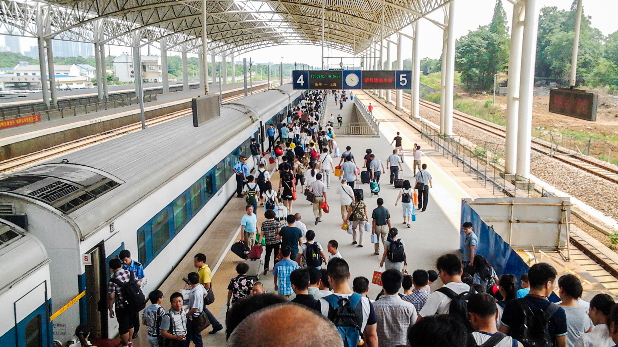 2014年6月，池州—上海T7608次列车停靠在铜陵站。